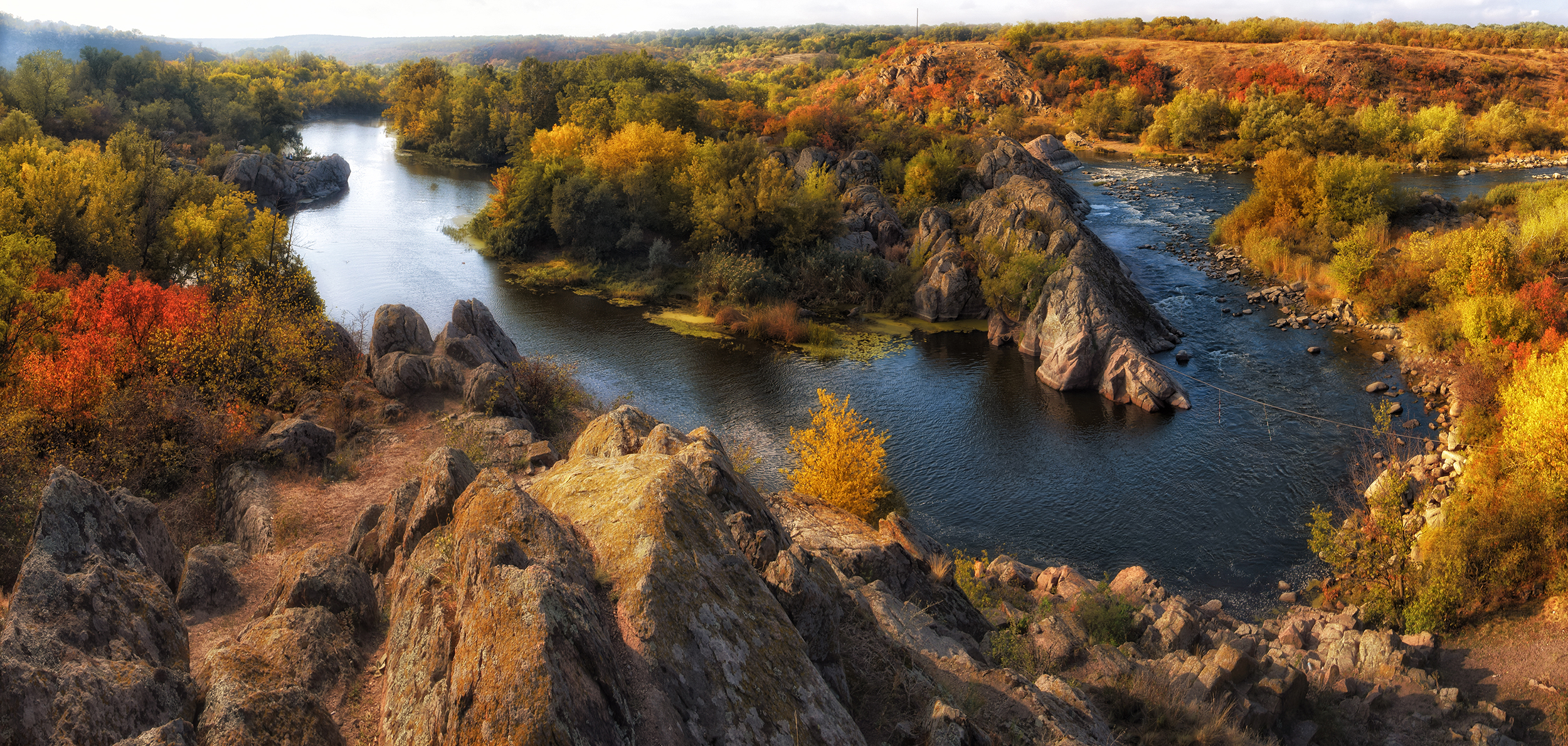 Національний природний парк «Бузький Гард», Кривоозерський, Первомайський, Арбузинський, Вознесенський, Доманівський, Братський р-ни